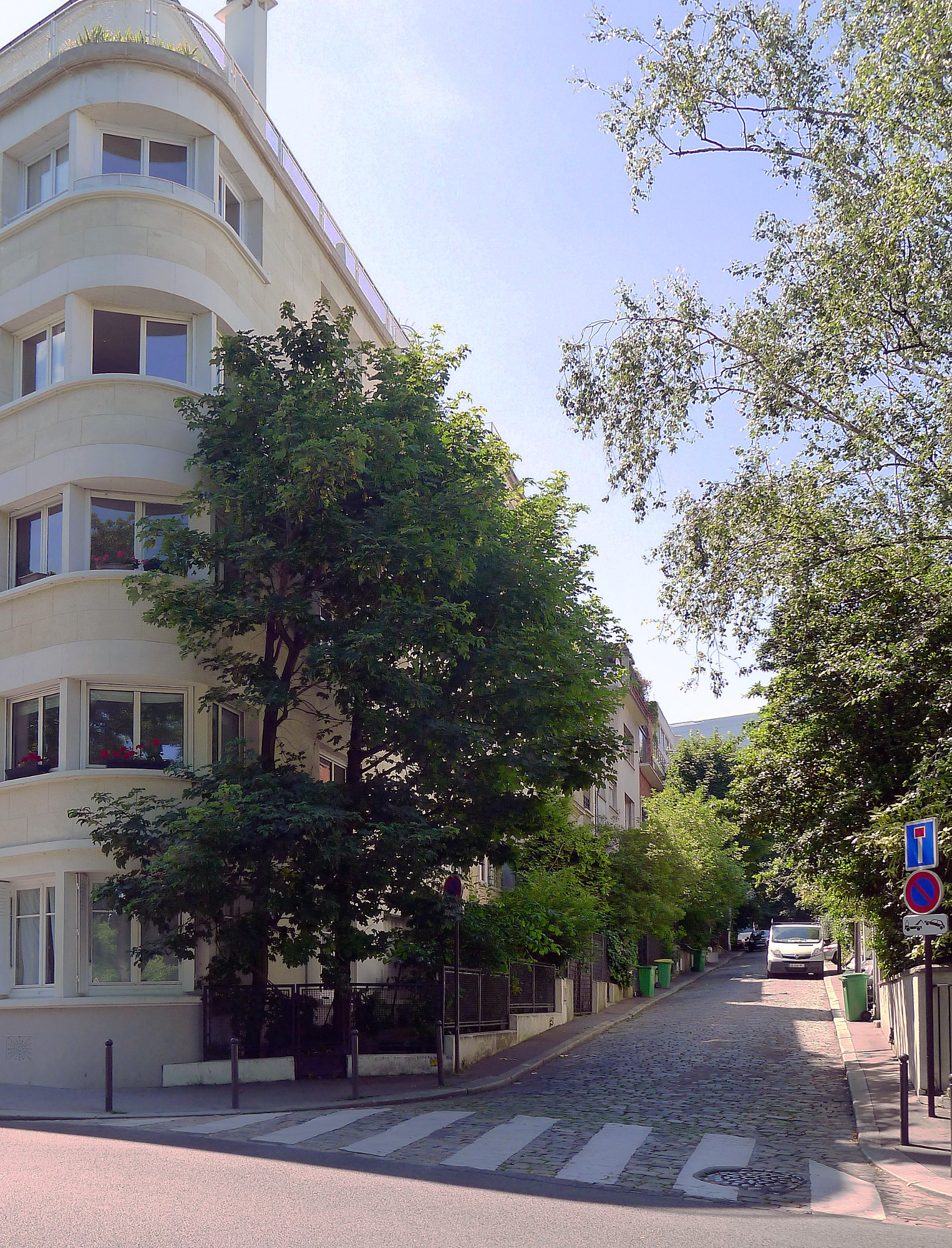 Rue Georges-Braque - Paris XIV